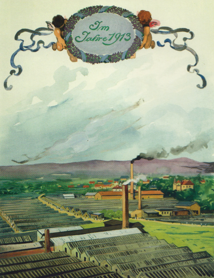 Seidelsche Gärtnerei in Dresden-Laubegast 1913